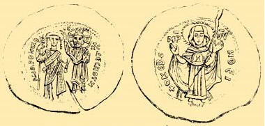 Andronikos I. Komnénos